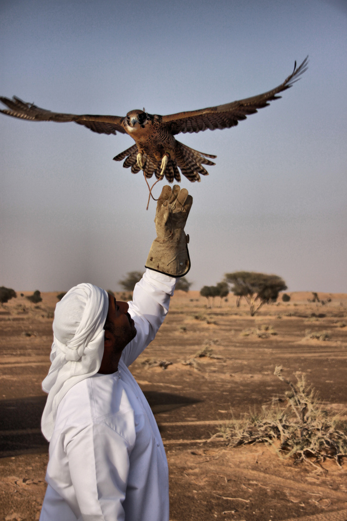 Falconry Day